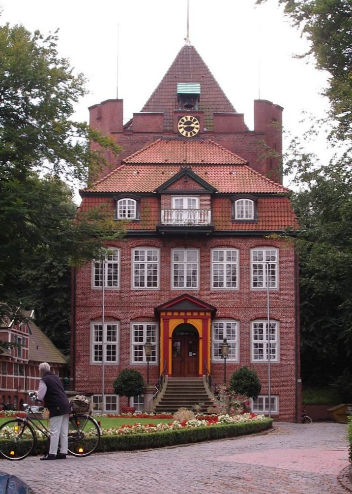 entzerrt (Original text: Cuxhaven, Schloss Ritzebüttel, ehemals Hamburgisches Amt Ritzebüttel) Foto von Benutzer:Geoz